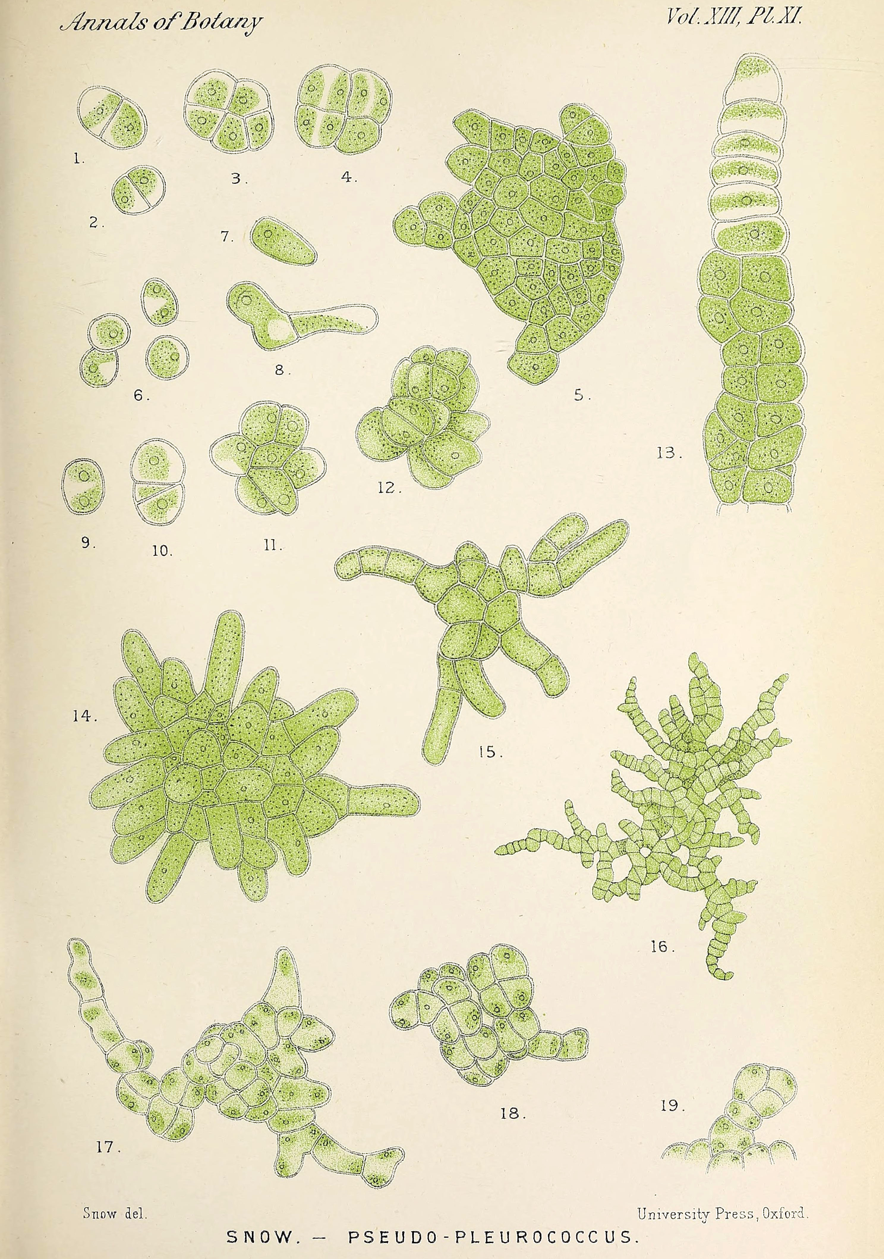 1-16. Pseudopleurococcus botryoides J.W.Snow 17-19. Pseudopleurococcus vulgaris J.W.Snow